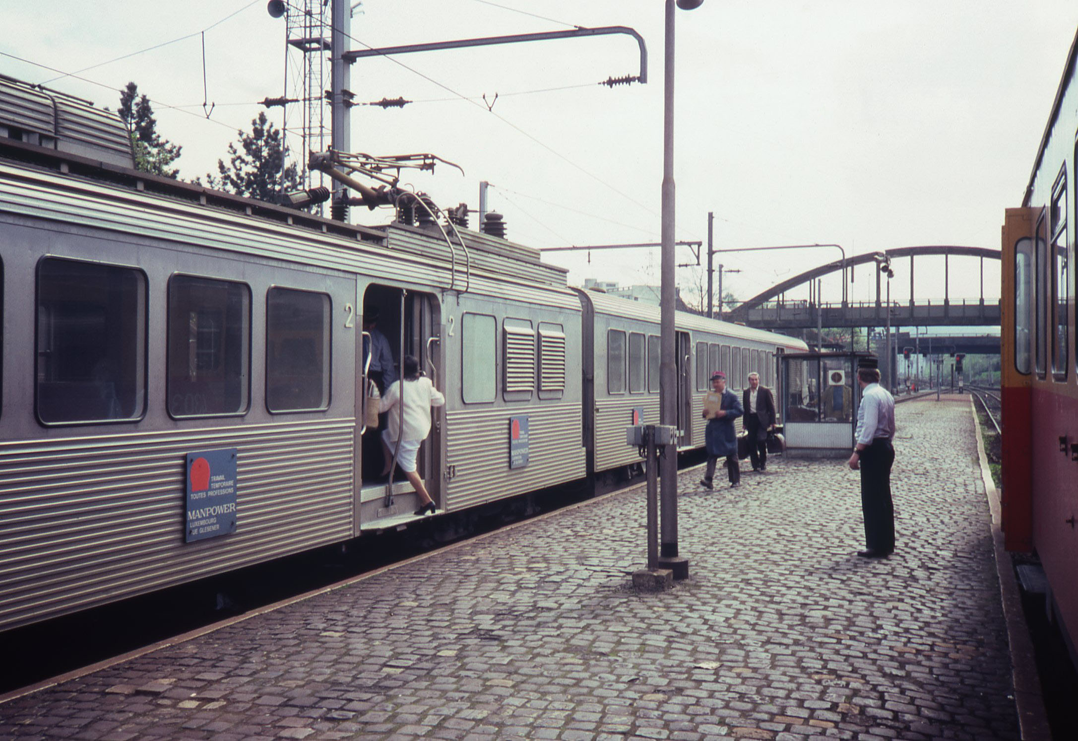 Athus met autorail en Luxemburgs elektrisch treinstel